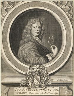 Leonard Plukenet (1641-1706), English botanist (Leonardi Plukenett, D.M.; Effigies Aetat suit 48. Ano Dom 1690)